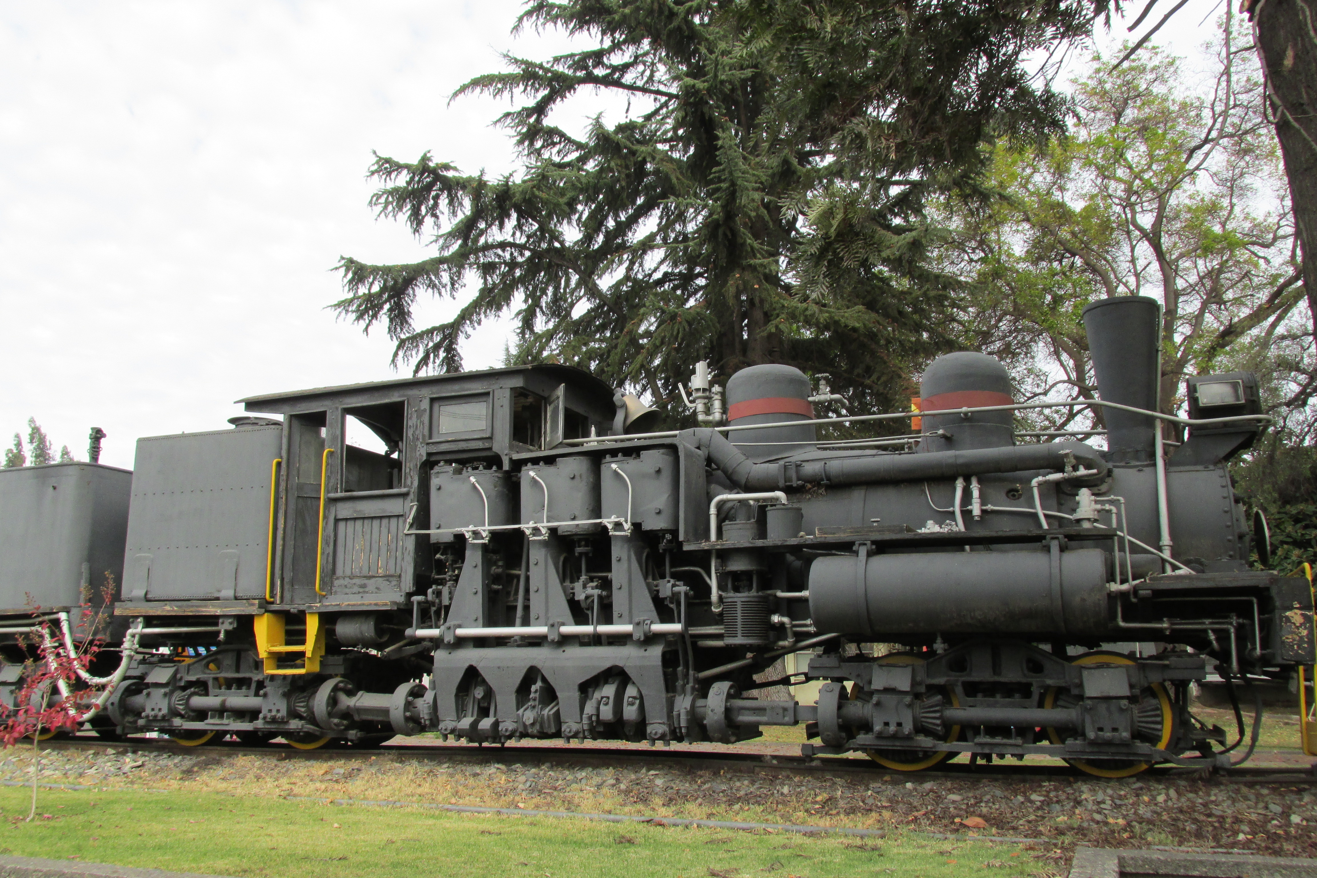 Antigua Locomotora Marca Lima Locomotive Corporation, de Tren a Campamento Minero El Teniente